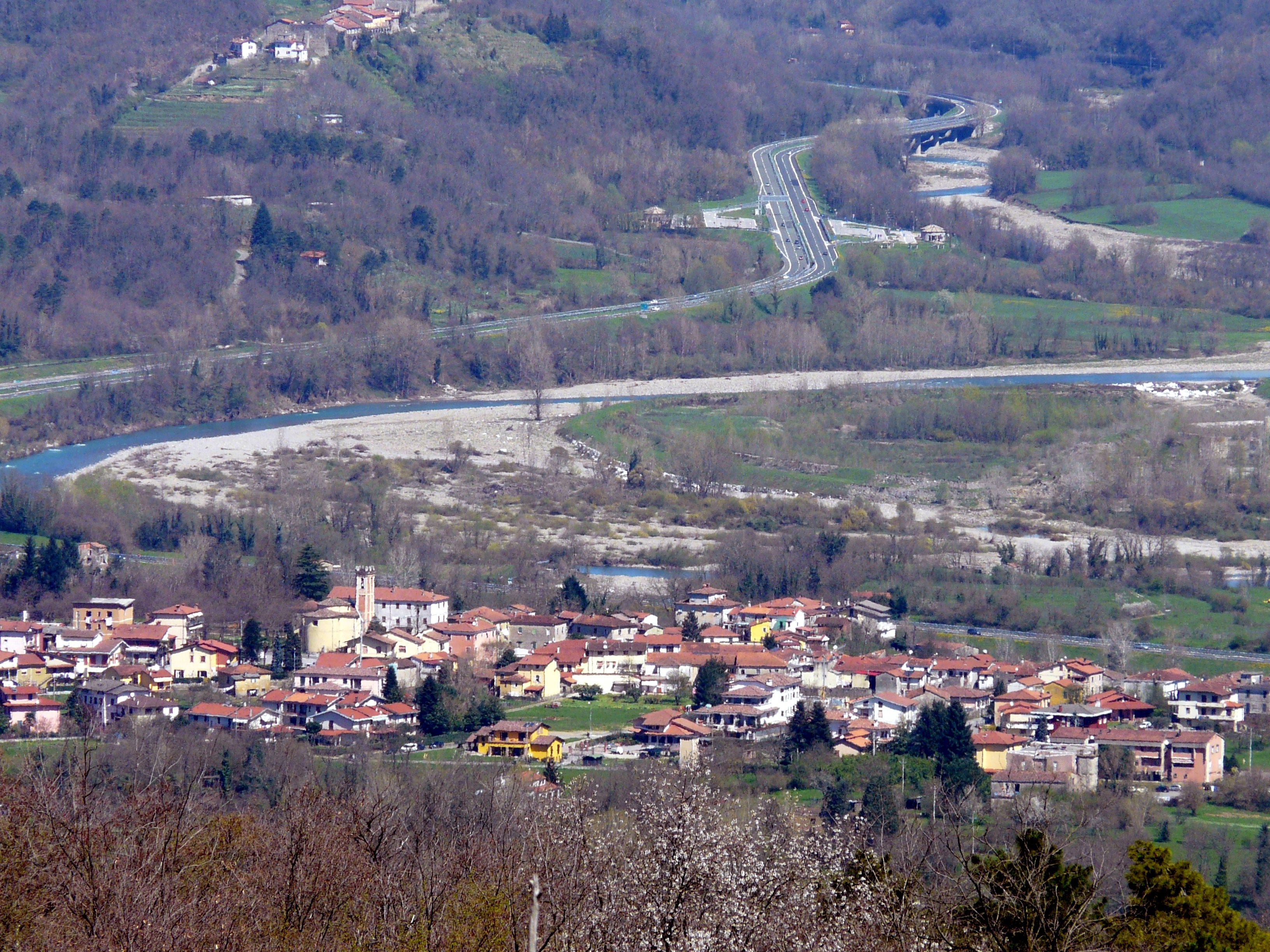 Panorama di Barbarasco (Tresana) dal santuario della Madonna della Neve o del Gaggio, Podenzana, Toscana, Italia